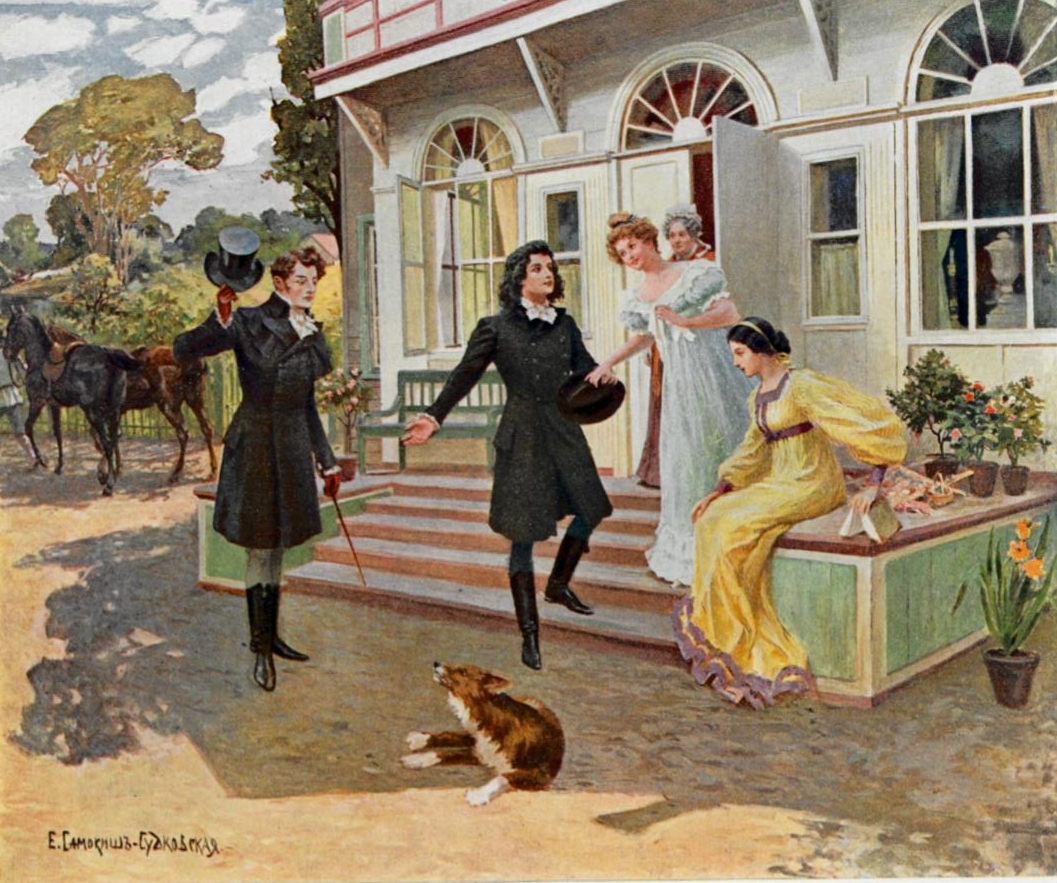 Пушкин А. Евгений Онегин. С иллюстрациями Е.Самокиш-Судковской. Издание первое. Пг., издание т-ва Р.Голике и А.Вильборг, 1908, 120 с., с илл. 26,2 x 23,2 см. Титульный лист работы А.Лео.